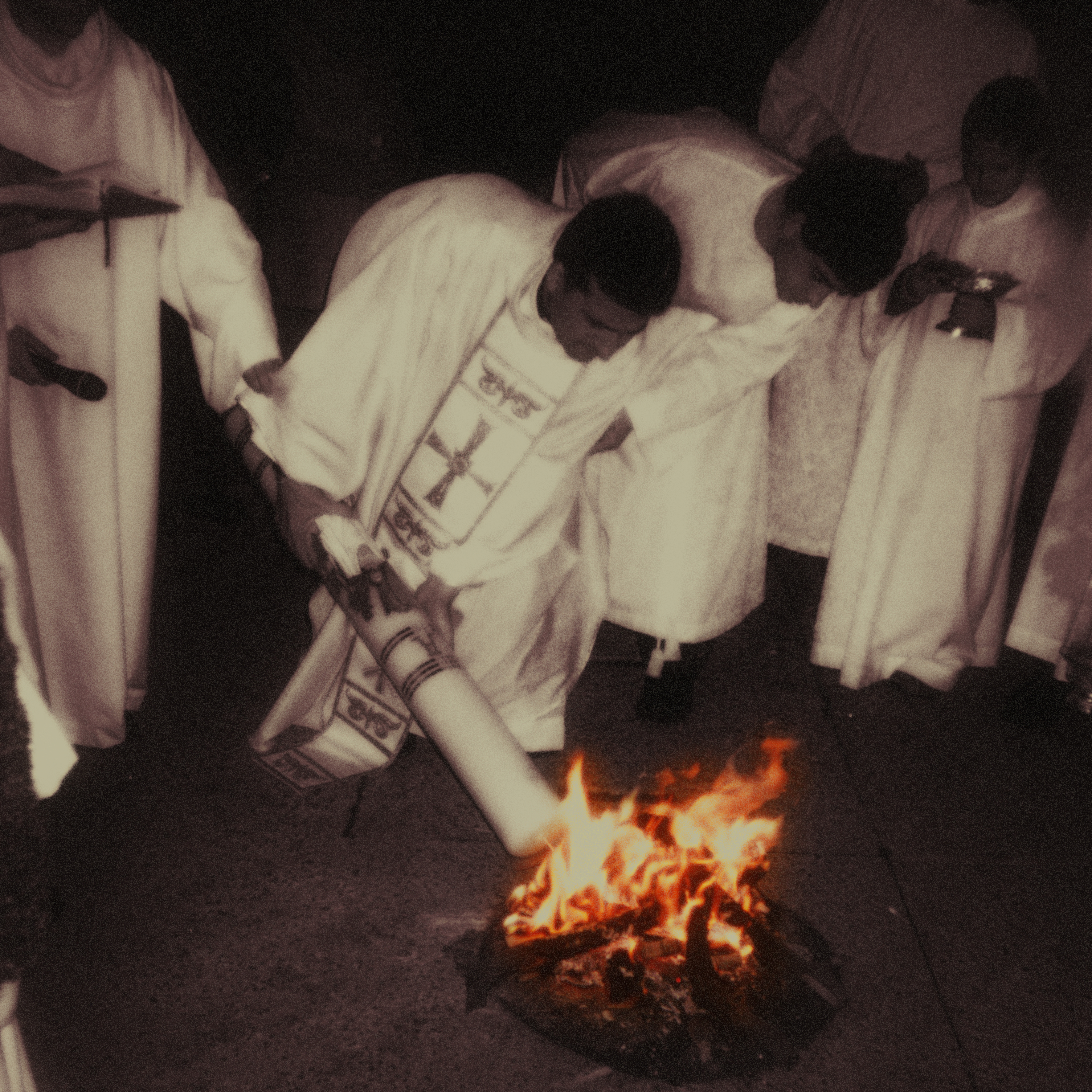 Records_1998-2006 2n premi del Concurs de Fotografia de Setmana Santa de Pego 2007